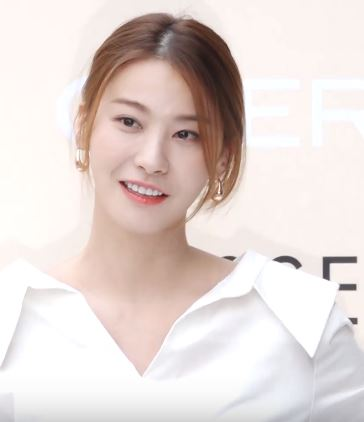 배우 유인영이 19일 오후 서울 서초구 반포동 현대백화점 강남점에서 열린 GUERLAIN(겔랑) 포토월에 참석했다.